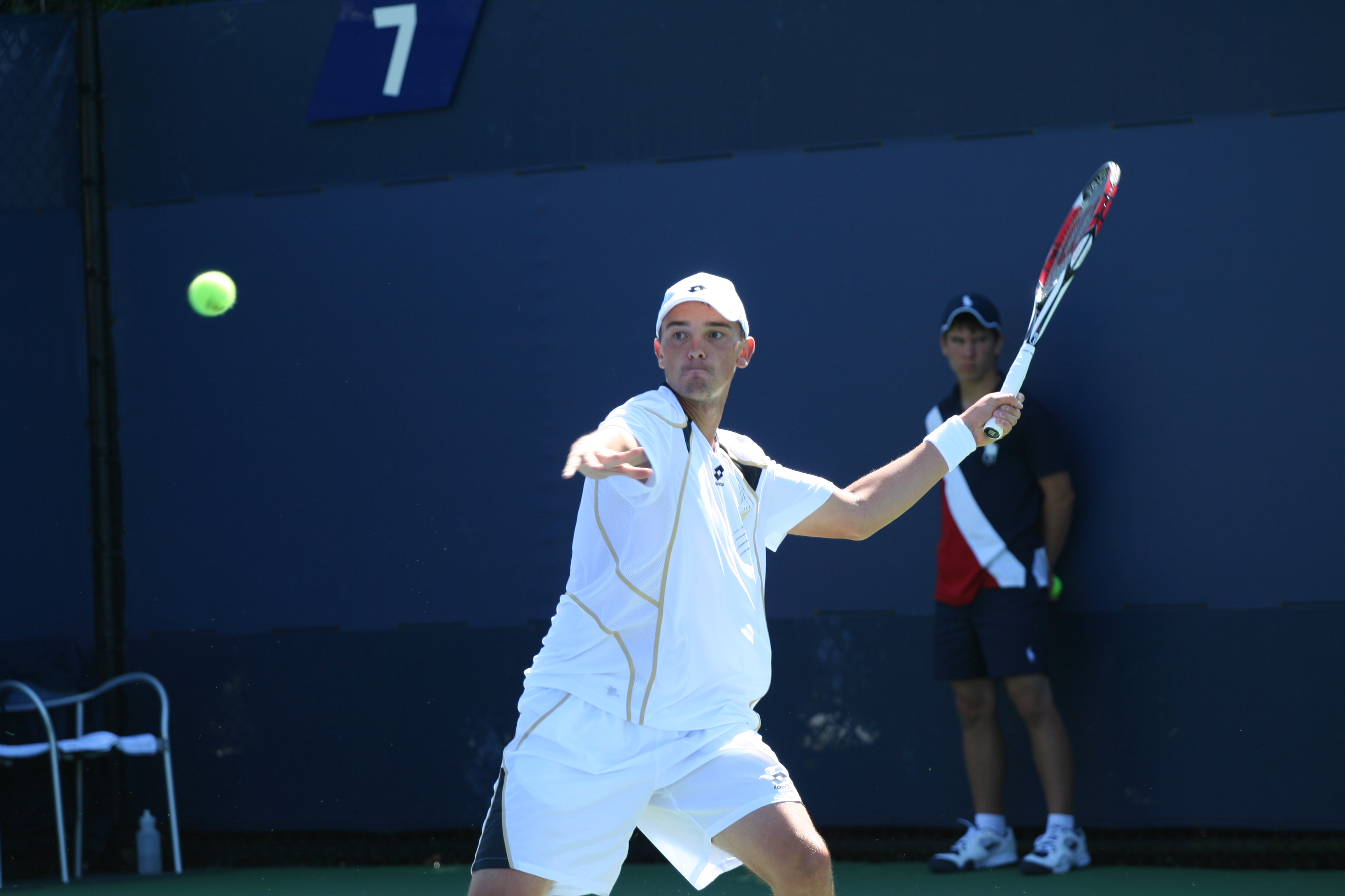 U.S. Open Wednesday, Sept. 2, 2009